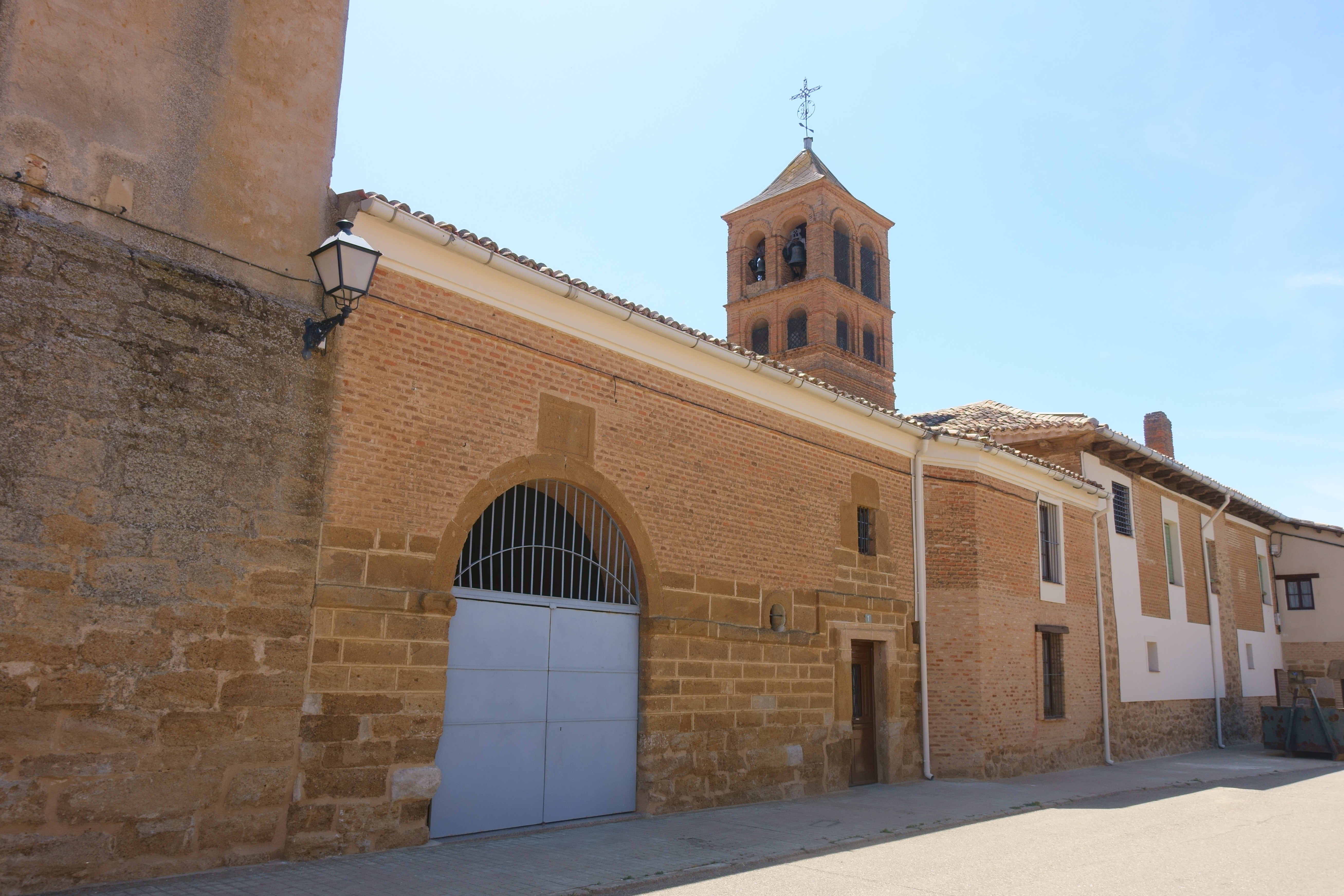 Convento de Santa Clara, Villafrechós (Valladolid, España).